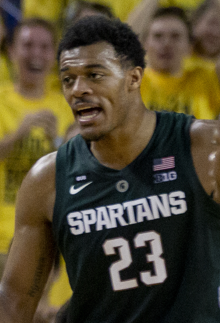 _MG_3531